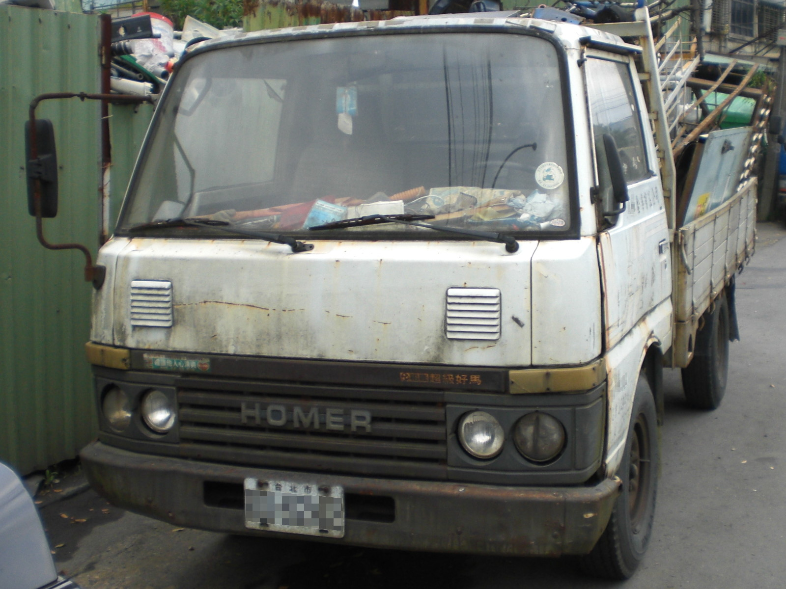 裕隆超級好馬貨車車頭外觀